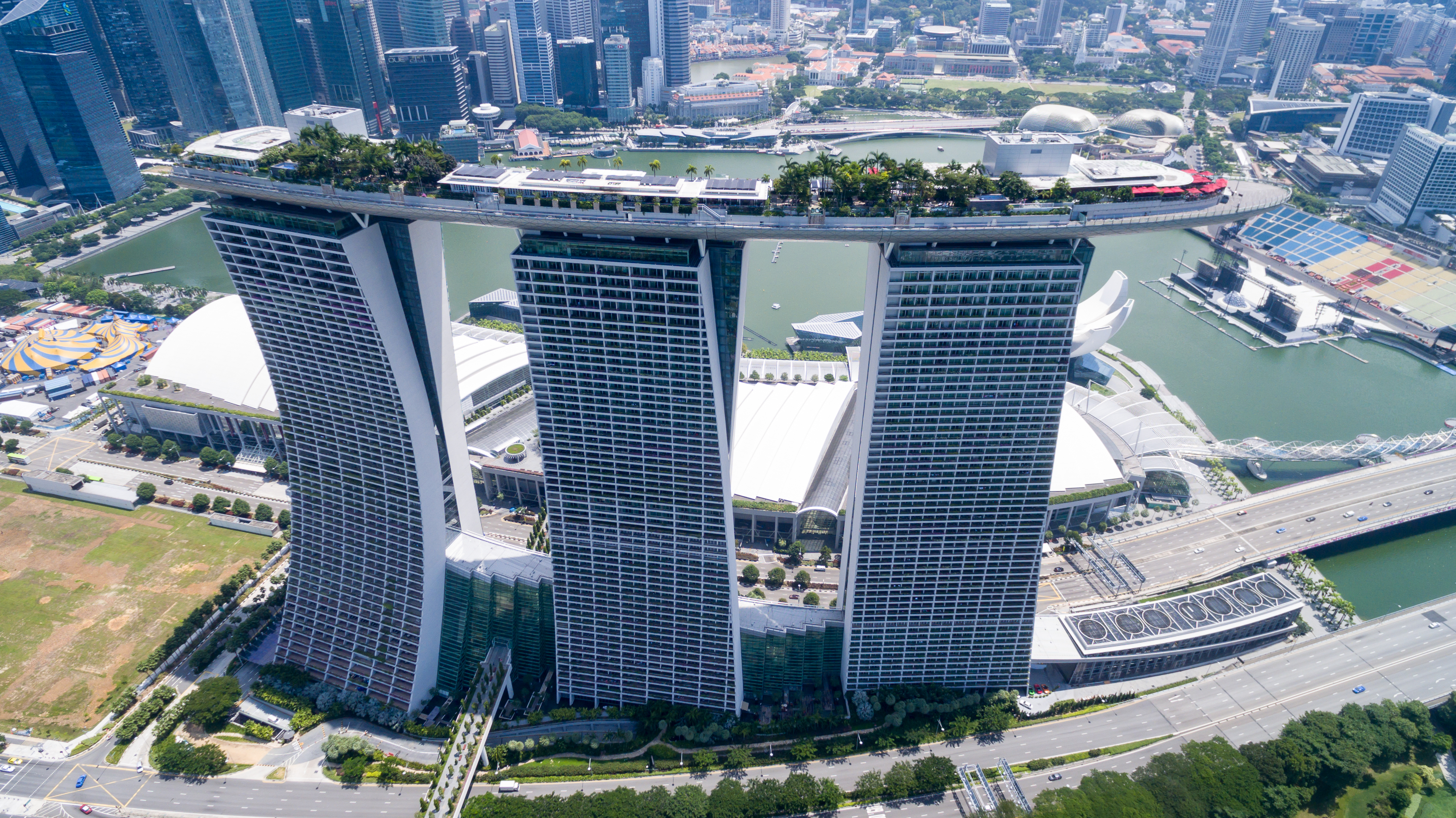 Luftbild Marina Bay Singapur Singapur